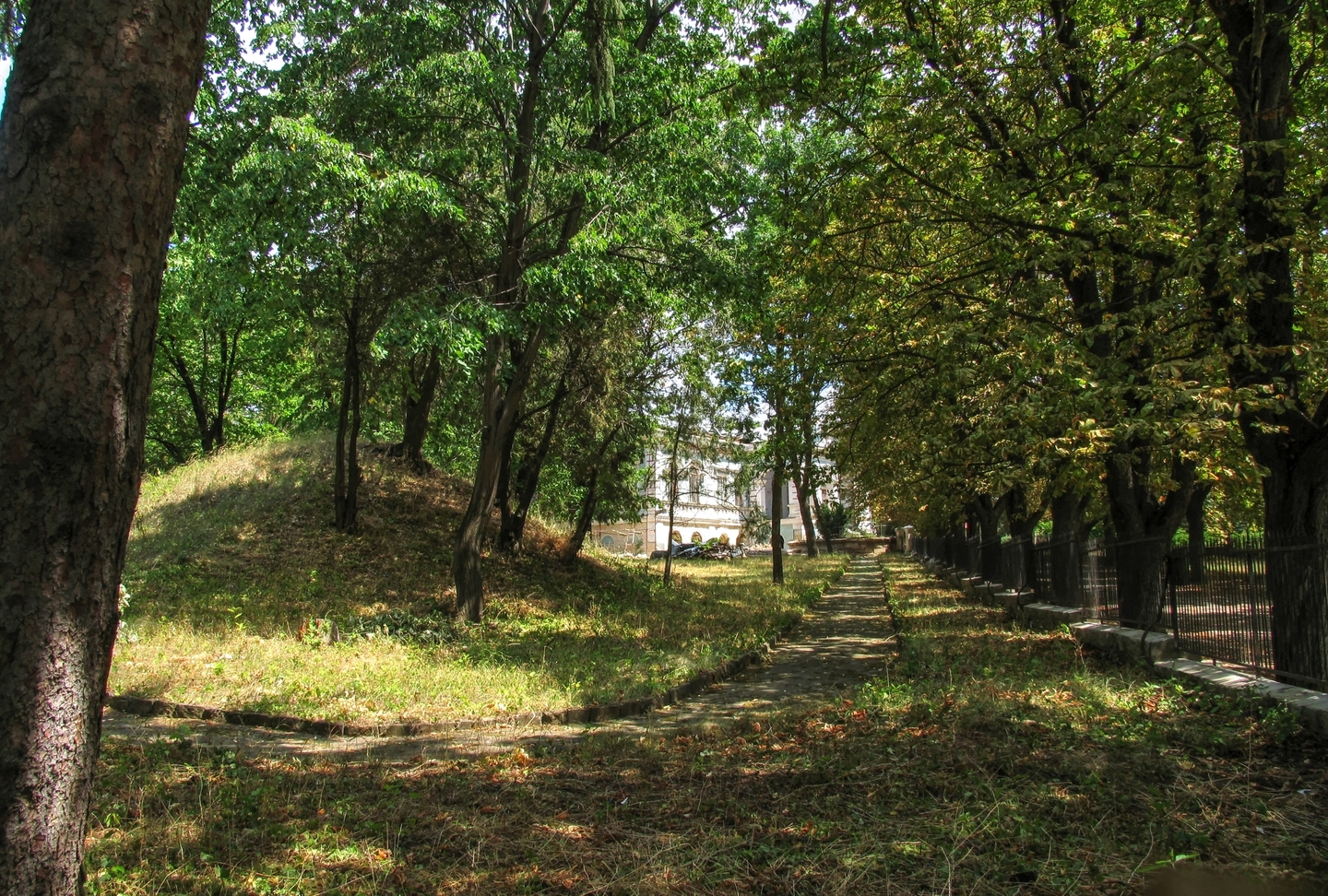 Иванчский парк, монумент природы, находится в Орхейский район, с. Иванча (код MD-OR-map-017)